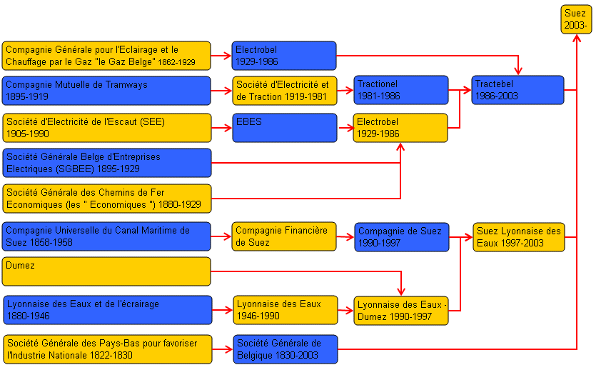 Source: Lax1 License: Public Domain